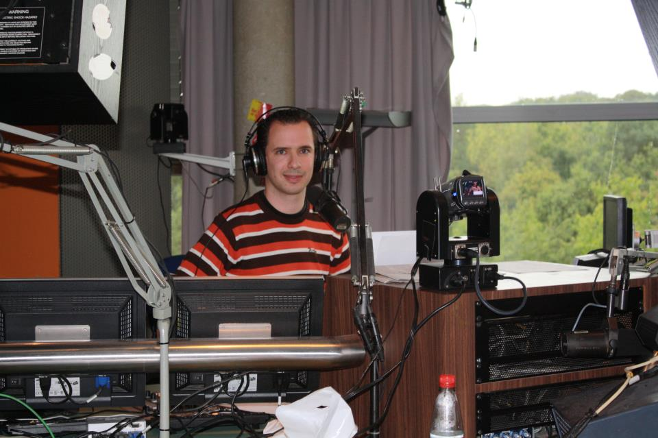 Bart Arens in de studio van 3FM.